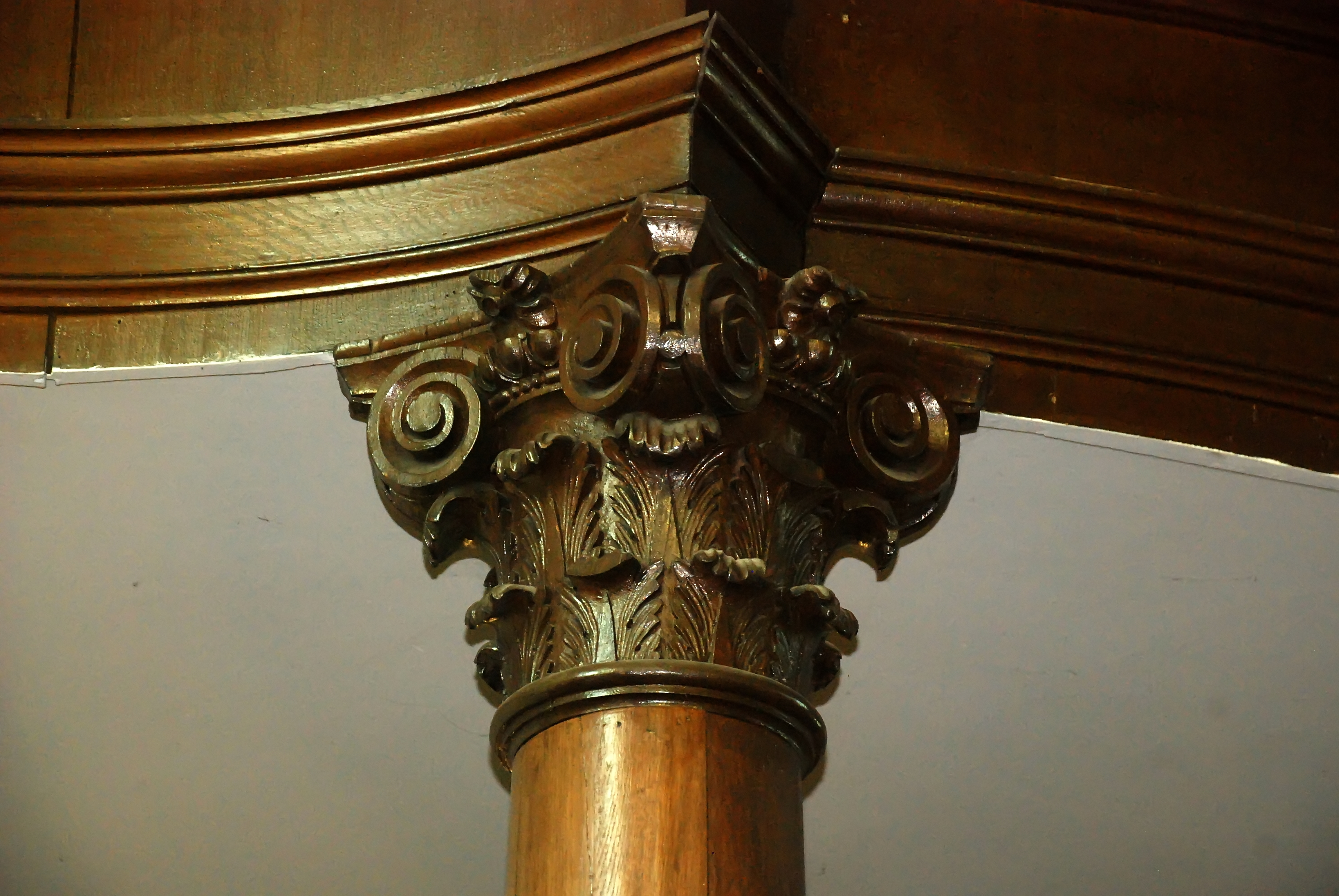 Belgique - Brabant wallon - Église de Court-Saint-Étienne